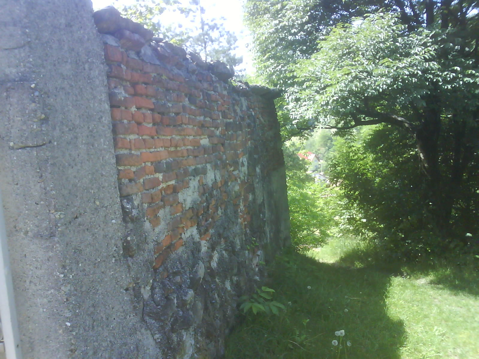 Biserica „Sf. Voievozi”?? a fostului Schit Cetățuia - municipiul Râmnicu Vâlcea, Str. Calea lui Traian 243A, pe Dealul Cetățuia